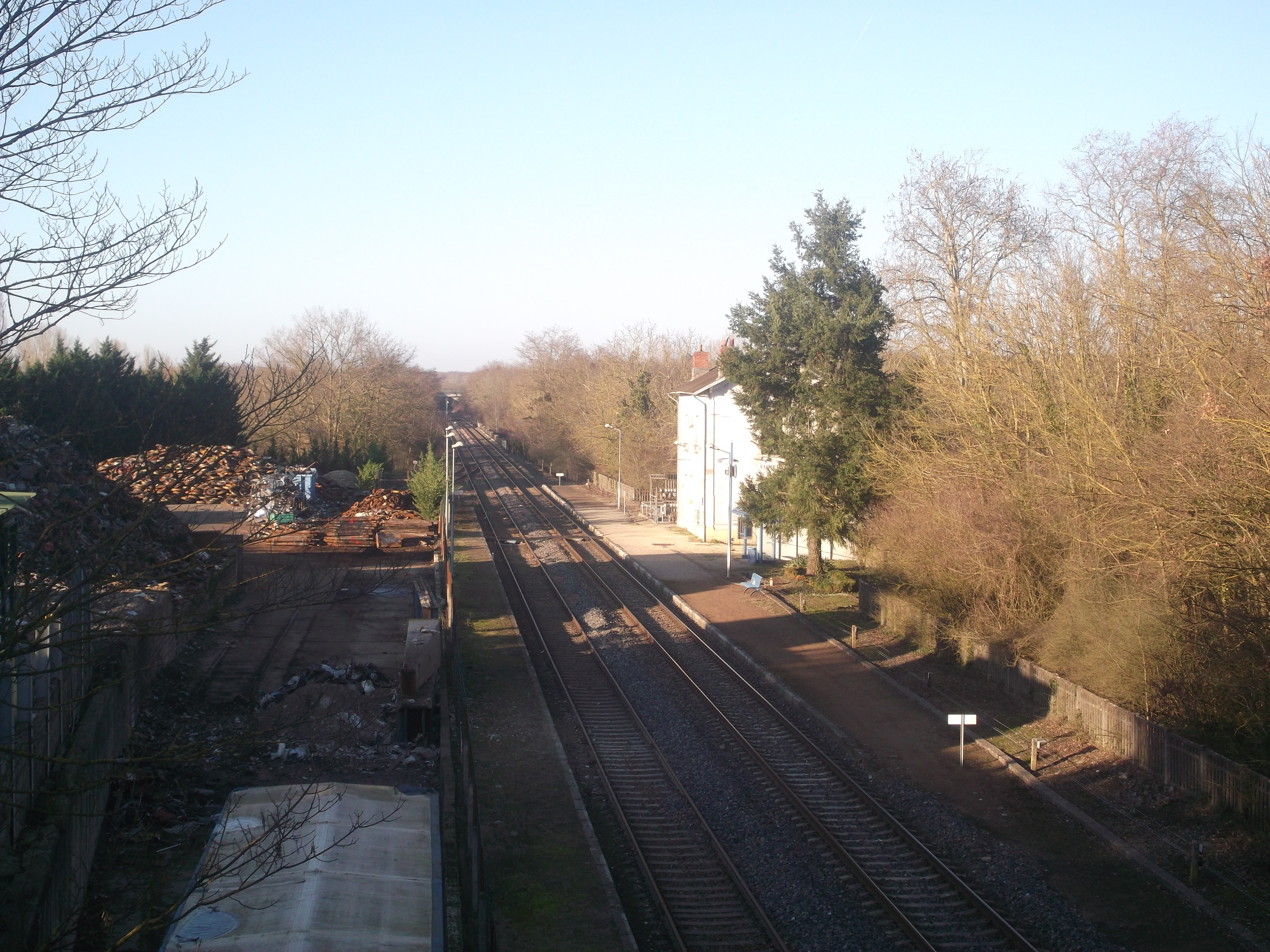 Vue générale de la gare de Lunery (Cher, France)